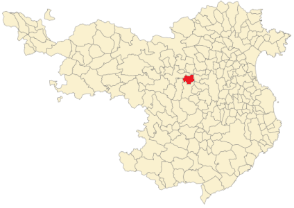 Situación de Serinyà en la provincia de Gerona.